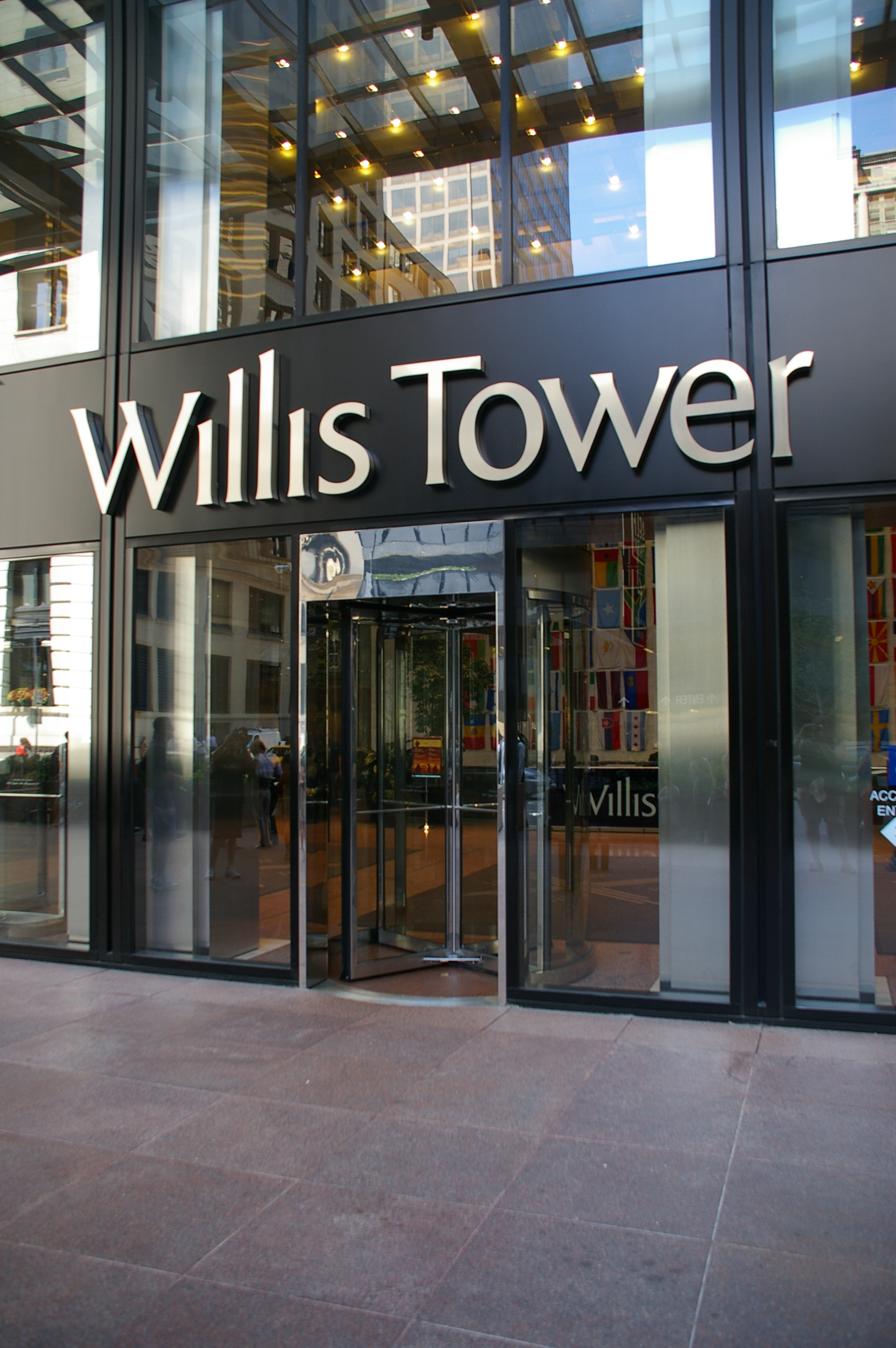 Haupteingang Willis Tower